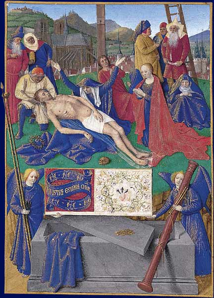 Au pied de la croix, la Vierge tient sur ses genoux le corps du Christ et lève les bras au ciel tandis que saint Jean, sainte Marie Madeleine et les saintes femmes sont en prière et derrière eux, Nicodème et Joseph d'Arimathie. A l'arrière plan se dresse la cathédrale Notre-Dame de Paris et un paysage parisien devant des collines. Au premier plan, se tiennent deux anges tenant les instruments de la Passion au pied d'un tombeau ouvert et vide et tenant un cartouche dans lequel se trouve une lettrine « S » et l'inscription « Maistre Estienne Ch[eva]l[ie]r » et le début d'un texte désormais caché. Cette miniature illustrait le début de la prière du Stabat Mater.